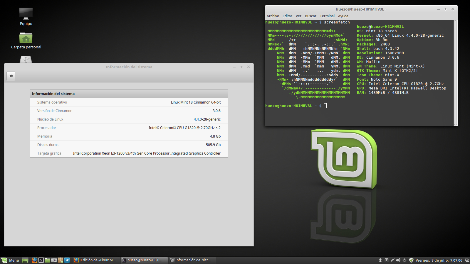 LinuxMint 18 Cinnamon